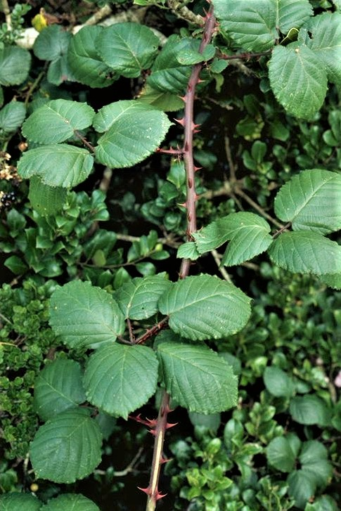 trailing stem and fully developed typical leaves of Rubus hochstetterorum Seub.